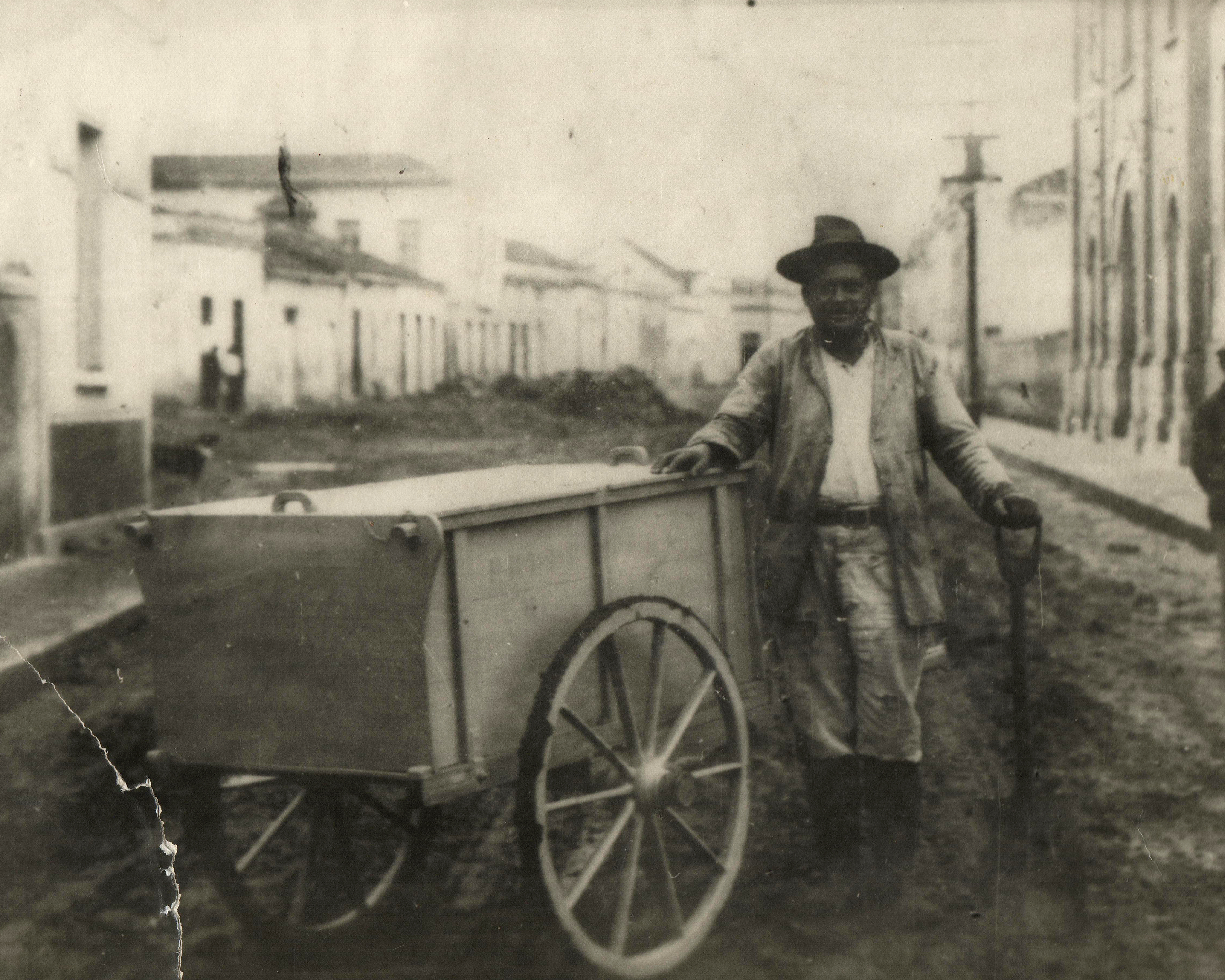 Sr. José Marciano 1º Lixeiro da PMG